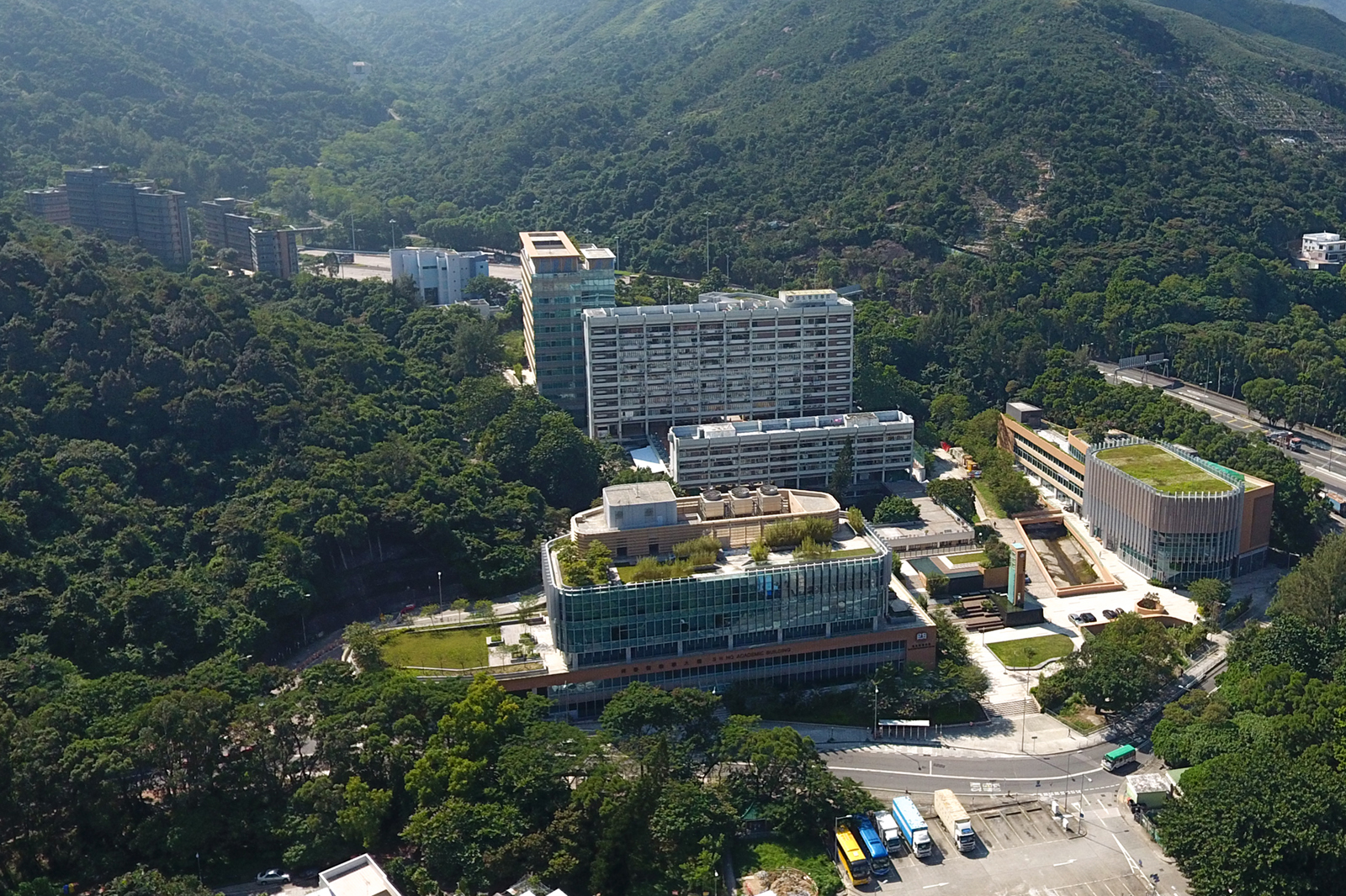 Hang Seng Management College